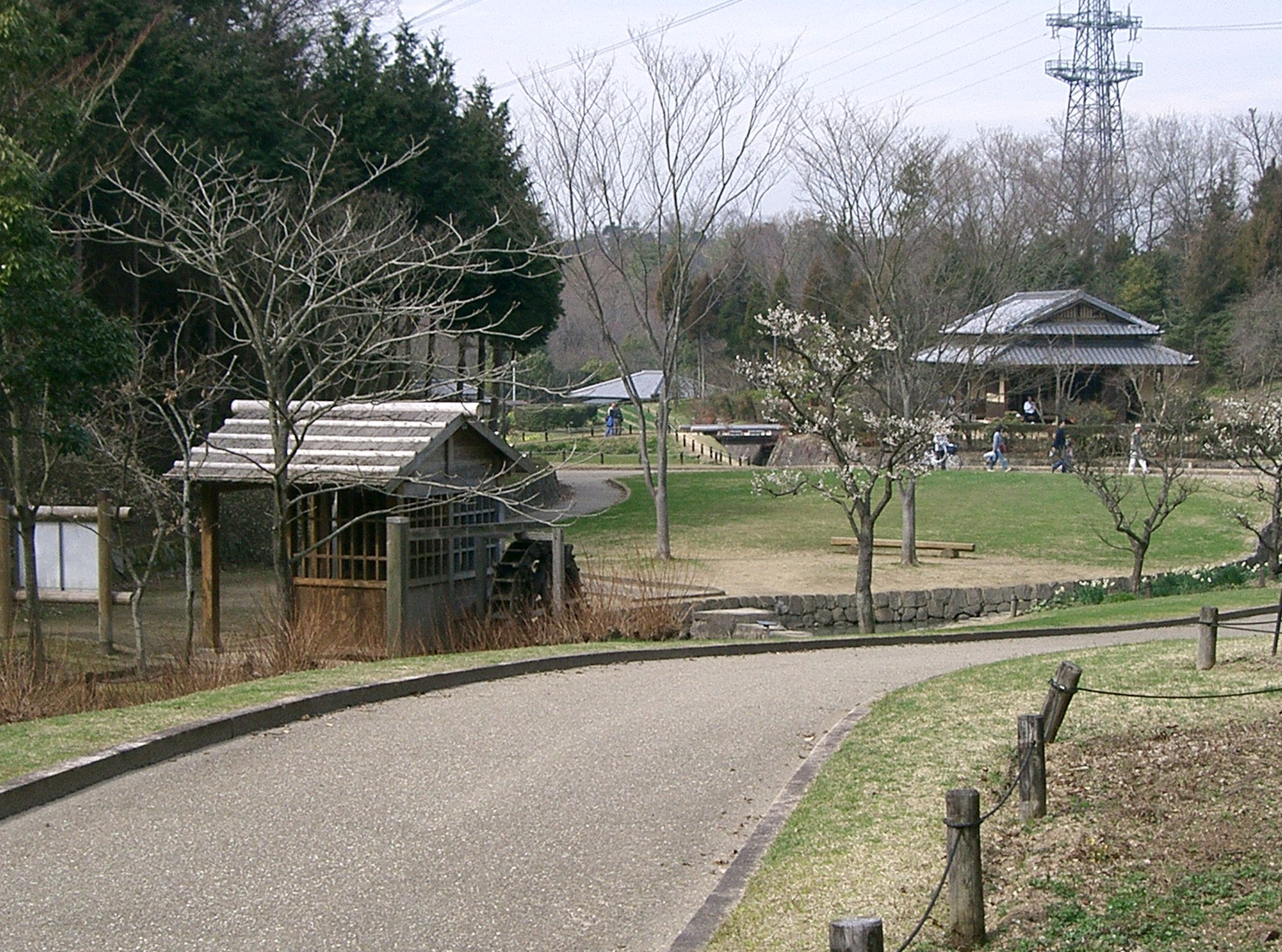 Nishikori park